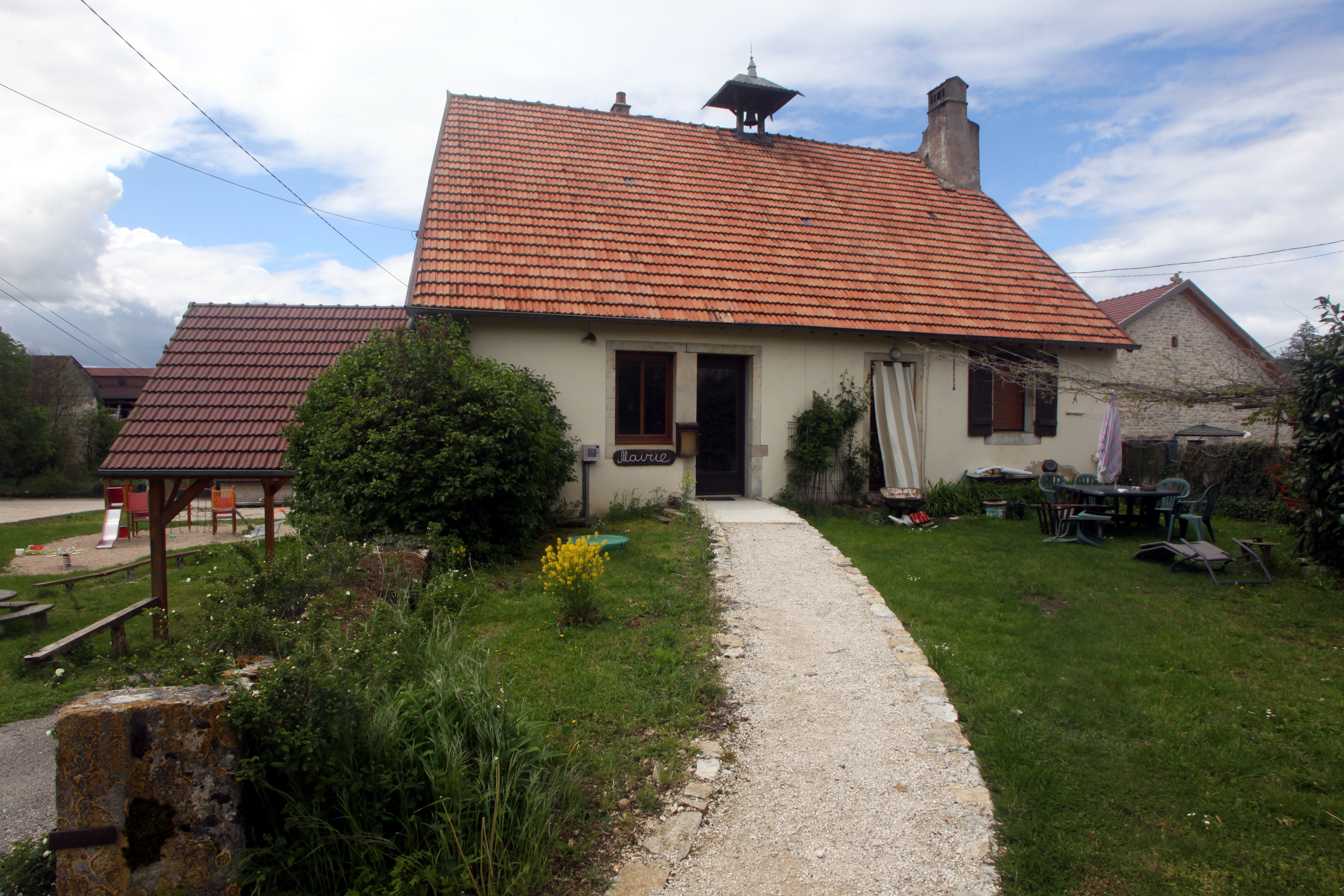 Mairie de Pessans.